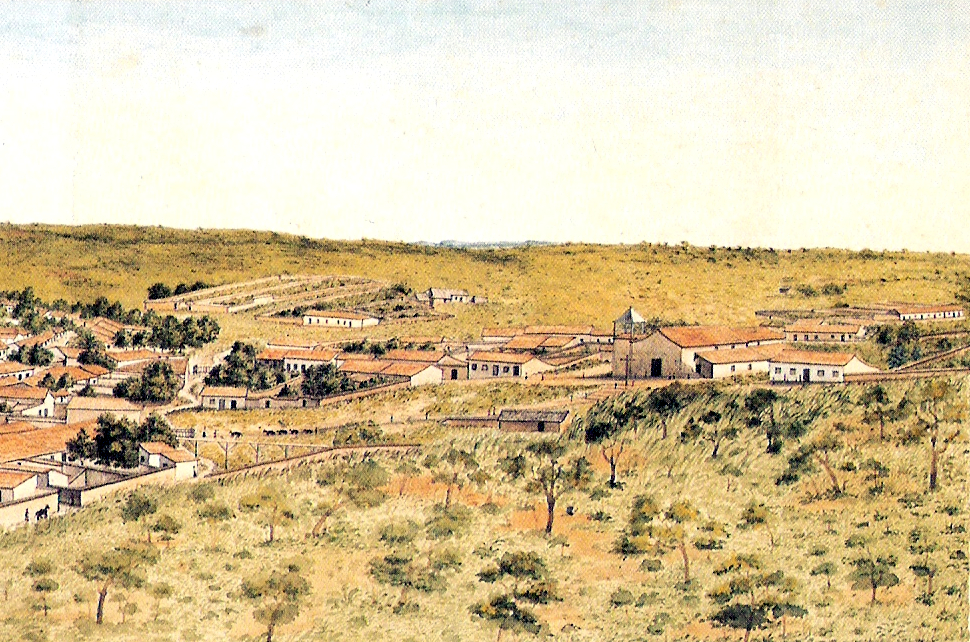 Detalhe do Prospecto da Villa do Bom Jesus de Cuyabá [...] feito durante a passagem da expedição de Alexandre Rodrigues Ferreira por Cuiabá, Mato Grosso, Brasil, tendo em destaque a Igreja de Nossa Senhora do Rosário e São Benedito.